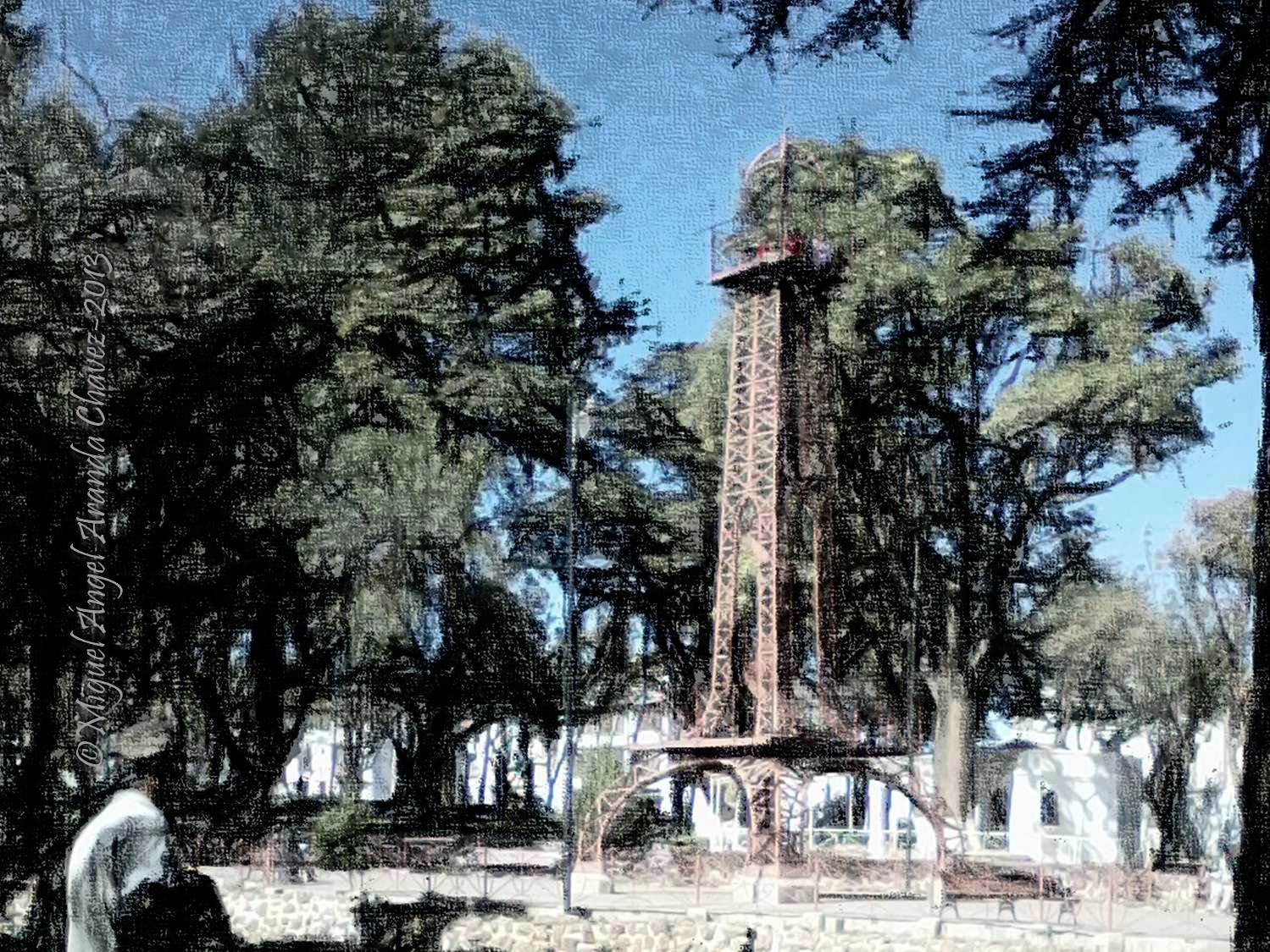 paisaje interno del Parque Bolívar en Sucre